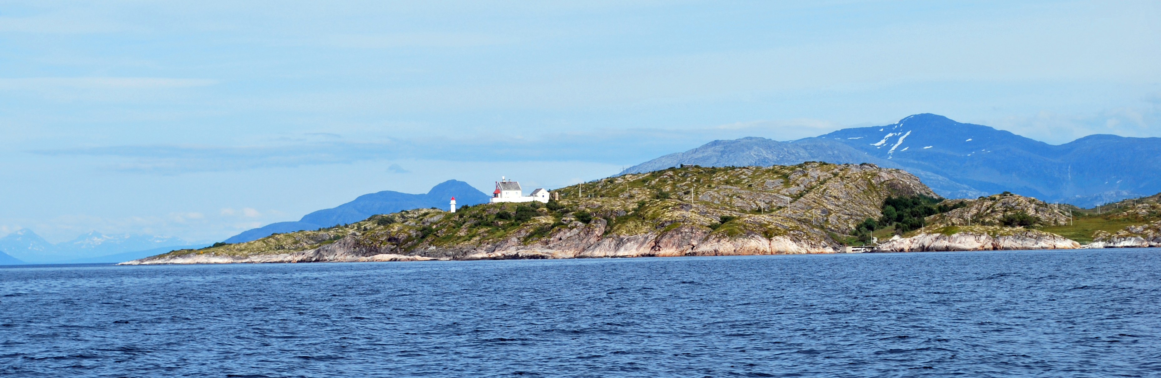 Barøya med Barøya fyr, Ballangen kommune